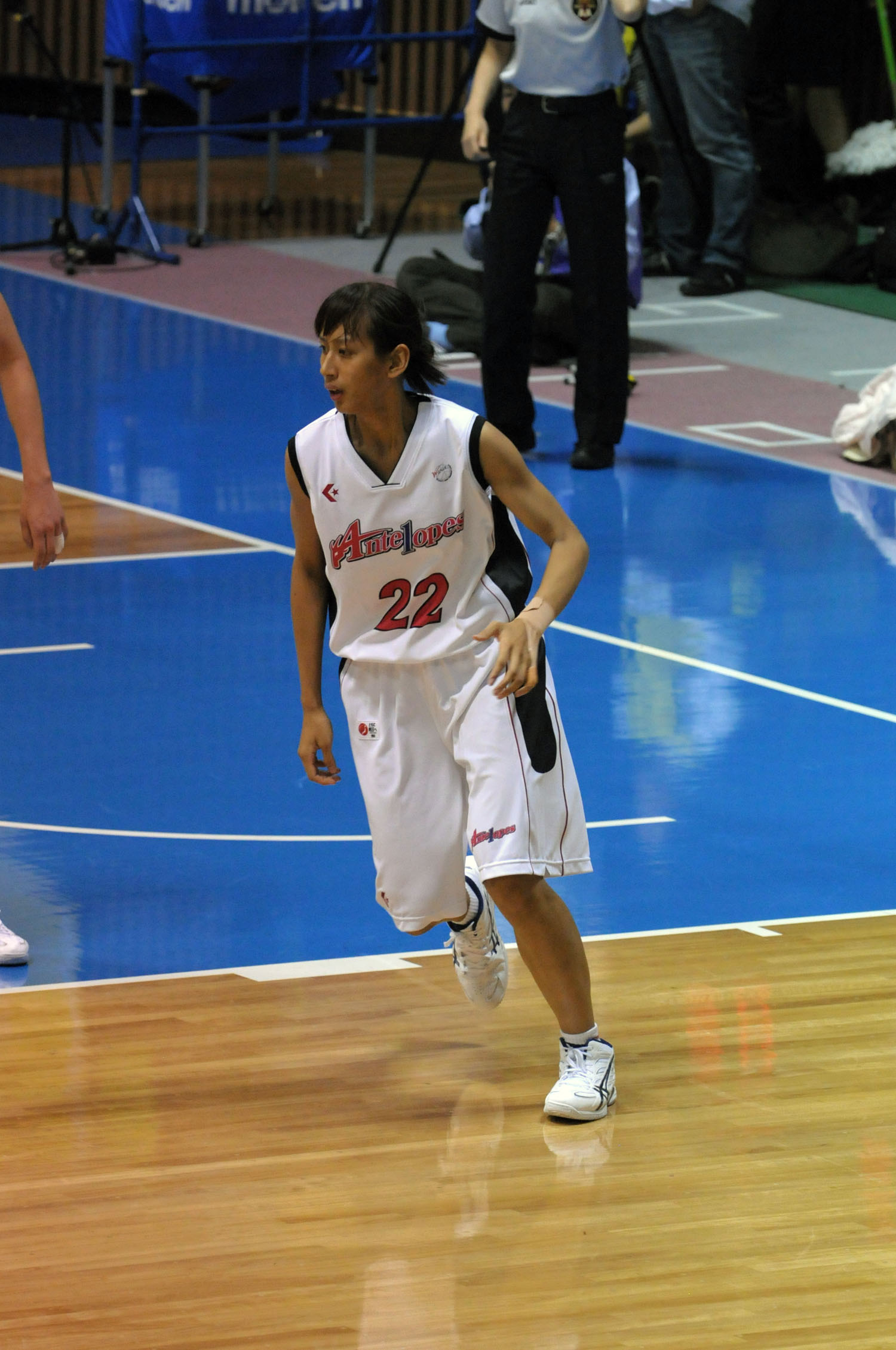 トヨタ自動車アンテロープス、森ムチャ選手。代々木第二体育館で。